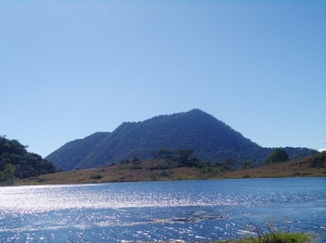 Volcán ubicado en Moyuta, departamento de Jutiapa